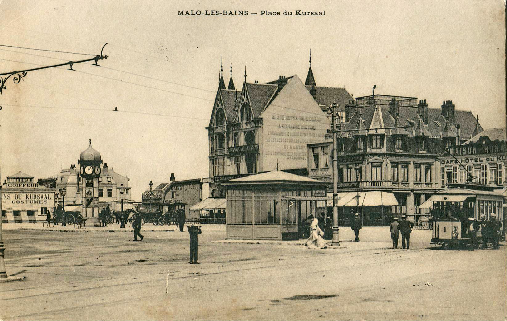 Carte postale ancienne éditée par Falciny à Dunkerque : MALO-LES-BAINS - Place du Kursaal. Vue de la station du tramway de Dunkerque et de sa motrice n°1, en son état d'origine avec ses plate-formes ouvertes